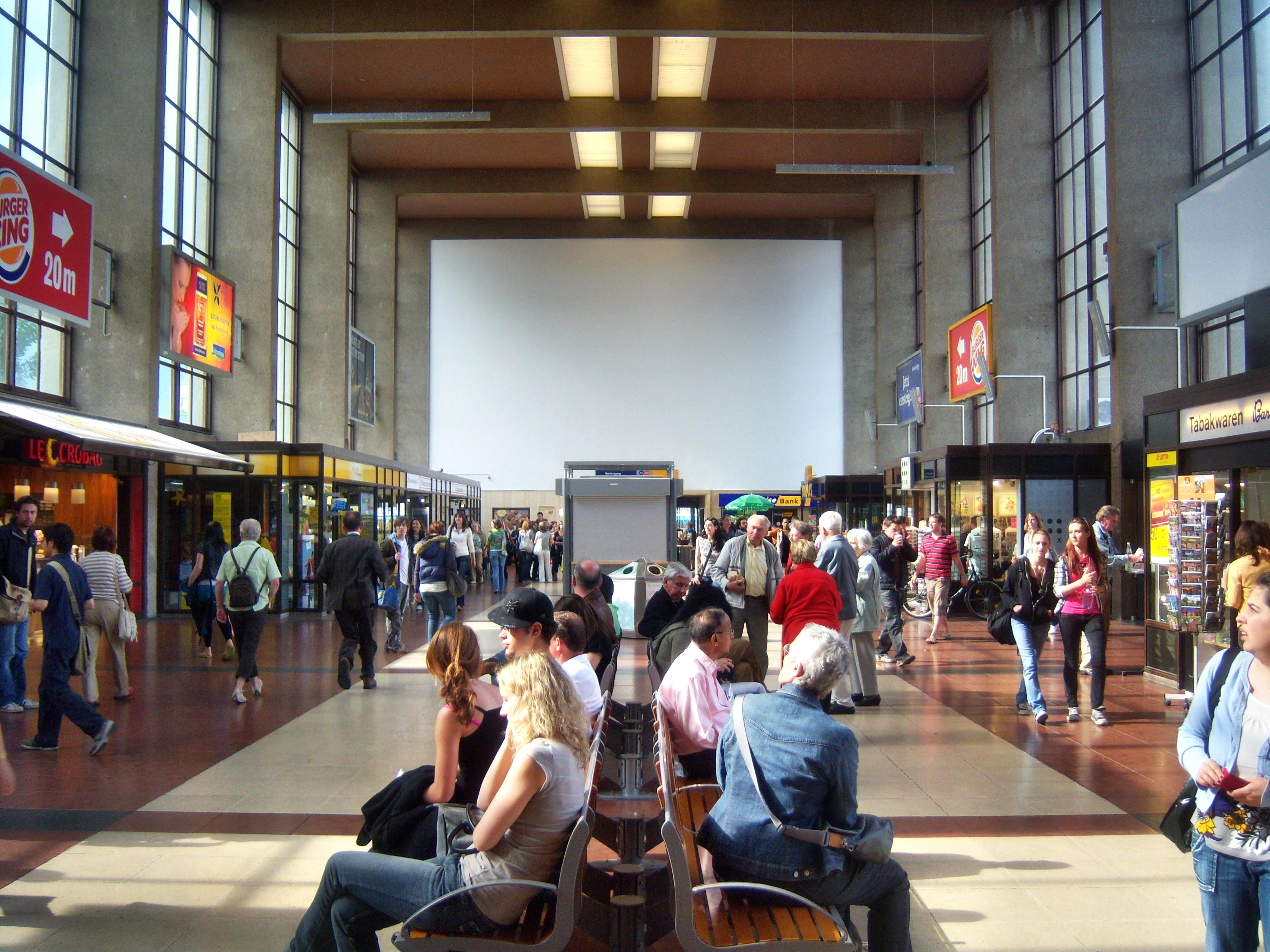 Das Hauptgebäude des Heidelberger Hauptbahnhofes